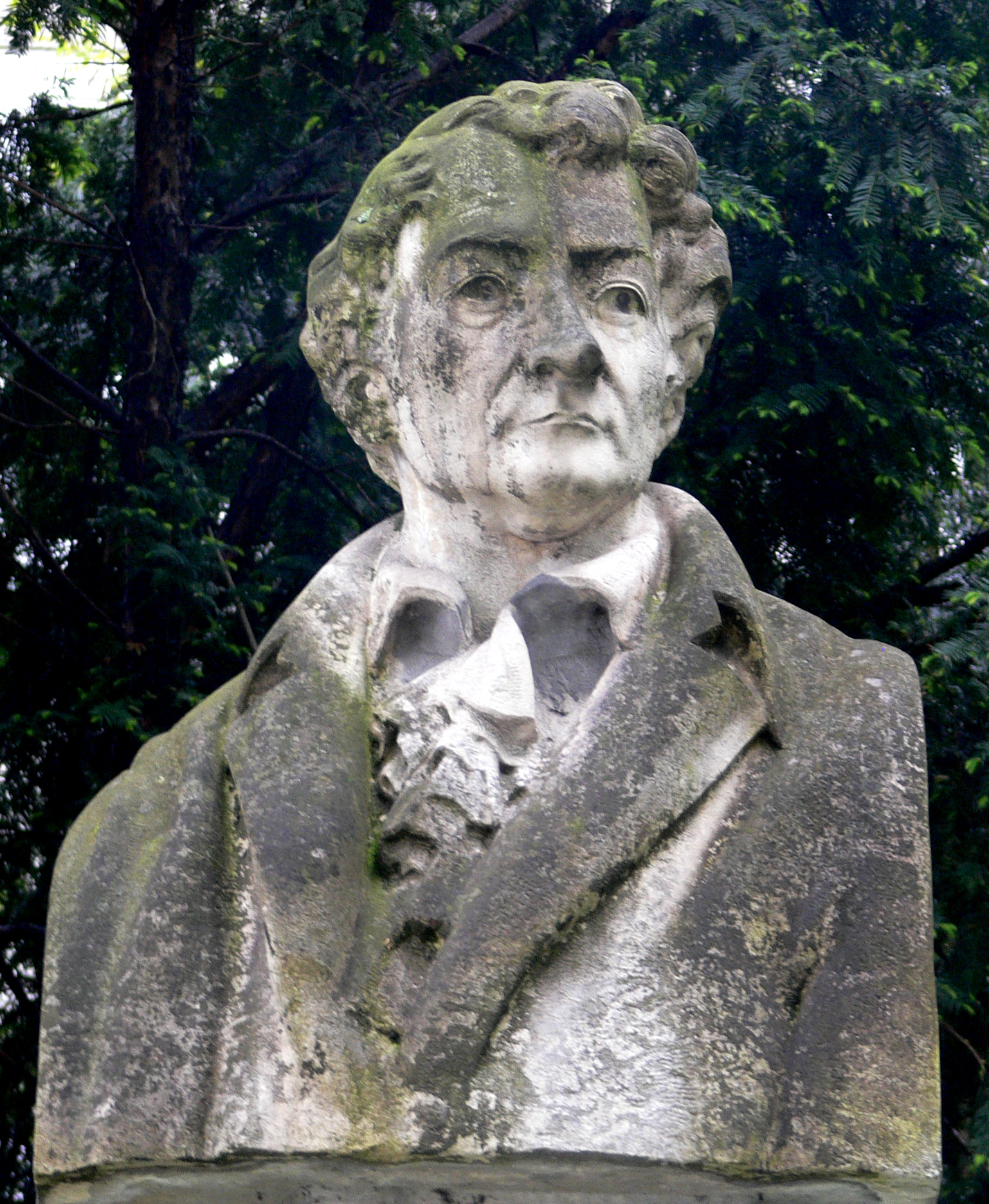 Jena: Denkmal für Paul Johann Anselm Feuerbach am Fürstengraben